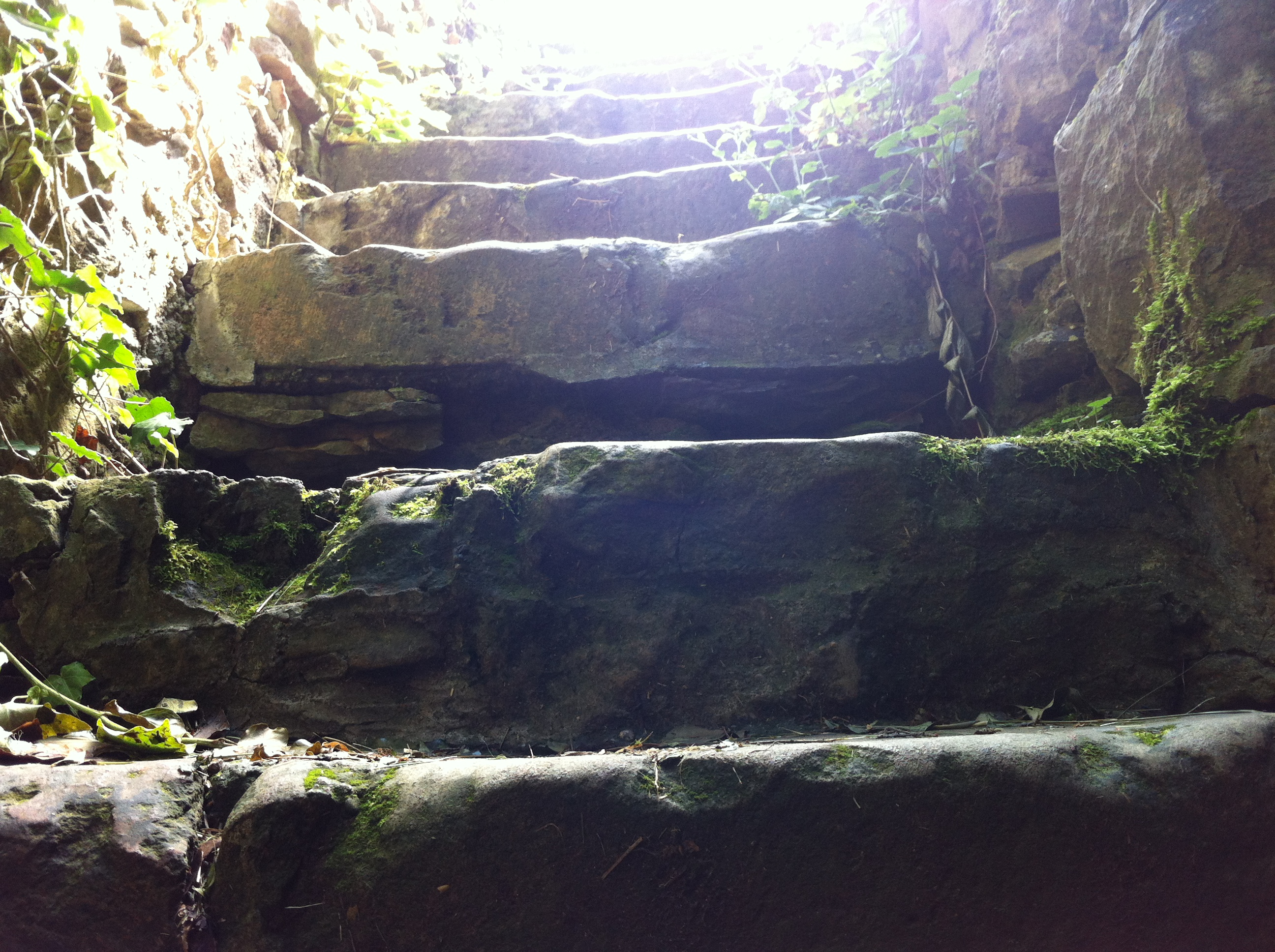 Ruine Küssaburg in Küssaberg im Landkreis Waldshut in Baden-Württemberg. Treppe zum Kerker im Südwestturm.